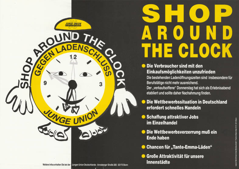 Shop around the clock gegen Ladenschluss Junge Union . Die Verbraucher sind mit den Einkaufsmöglichkeiten unzufrieden ... . Die Wettbewerbssituation in Deutschland erfordert schnelles Handeln . Schaffung attraktiver Jobs im Einzelhandel . Die Wettbewerbsverzerrung muß ein Ende haben . Chancen für "Tante-Emma-Läden" . Große Attraktivität für unsere Innenstädte ... Abbildung: Wecker (figürliche Grafik) Plakatart: Motiv-/Textplakat Auftraggeber: JU Deutschlands Drucker_Druckart_Druckort: Layout, Satz und Druck: Union Betriebs-GmbH, Bonn Objekt-Signatur: 10-028 : 286 Bestand: Plakate von Jugendorganisationen der Parteien ( 10-028) GliederungBestand10-18: Plakate von Jugendorganisationen der Parteien (10-028) » CDU » Motiv- und Textplakate Lizenz: KAS/ACDP 10-028 : 286 CC-BY-SA 3.0 DE